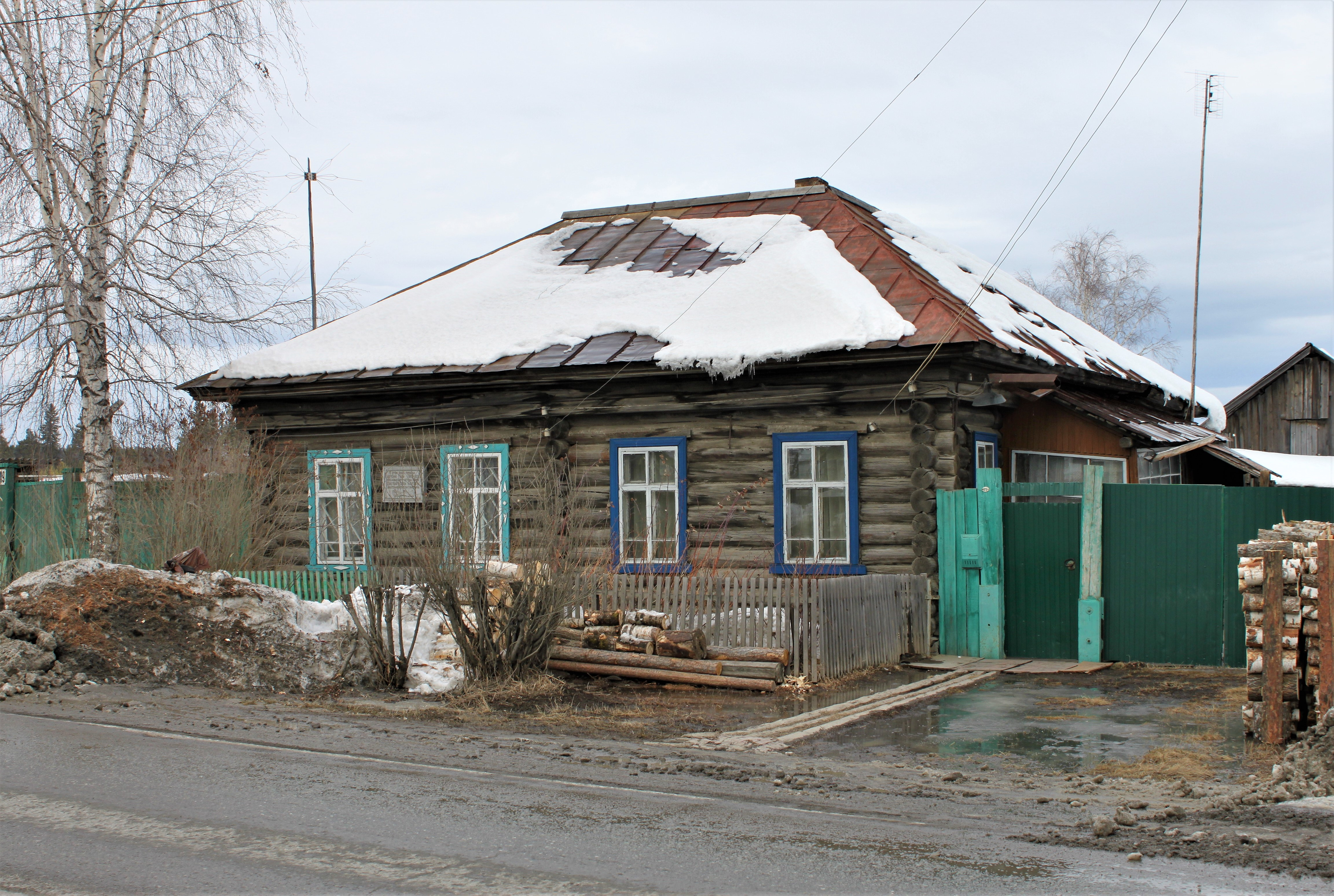 Дом семьи Серовых, где провёл своё детство будущий Герой Советского Союза Анатолий Константинович Серов (Свердловская область, город Карпинск, ул. Республики, 89)